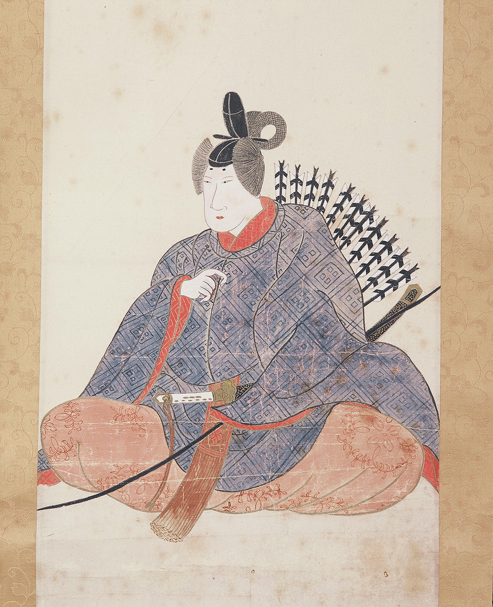 南部信興の肖像。